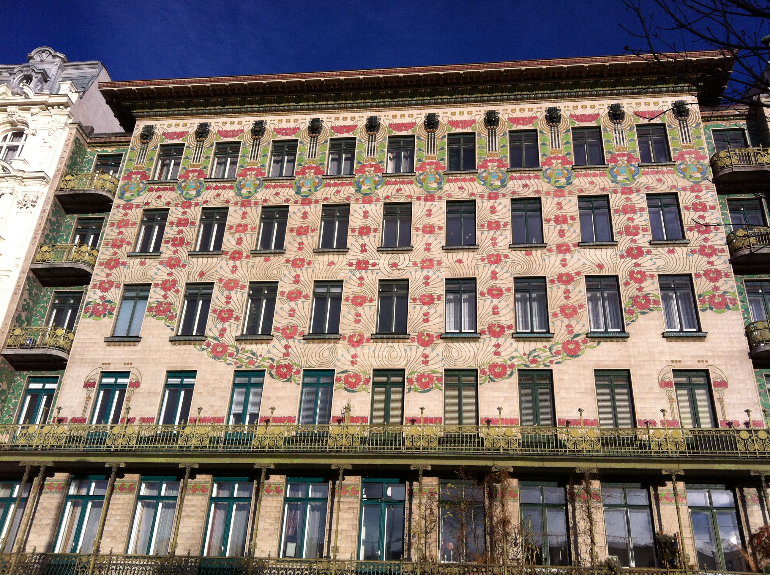 Otto Wagner Linke Wienzeile 40 ( Majolikahaus) - 1